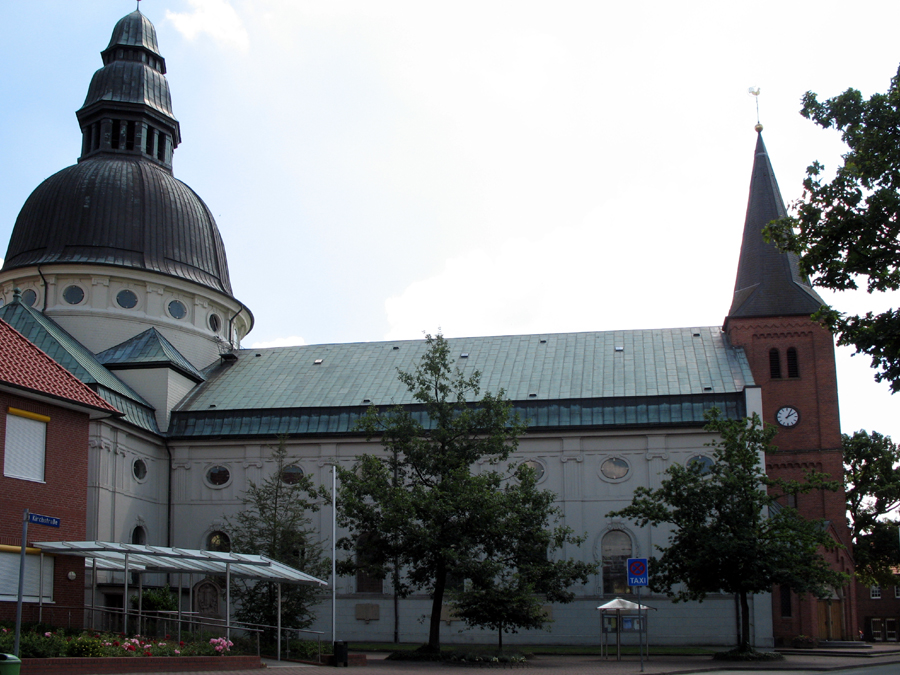 Emslanddom in Haren, Außenansicht